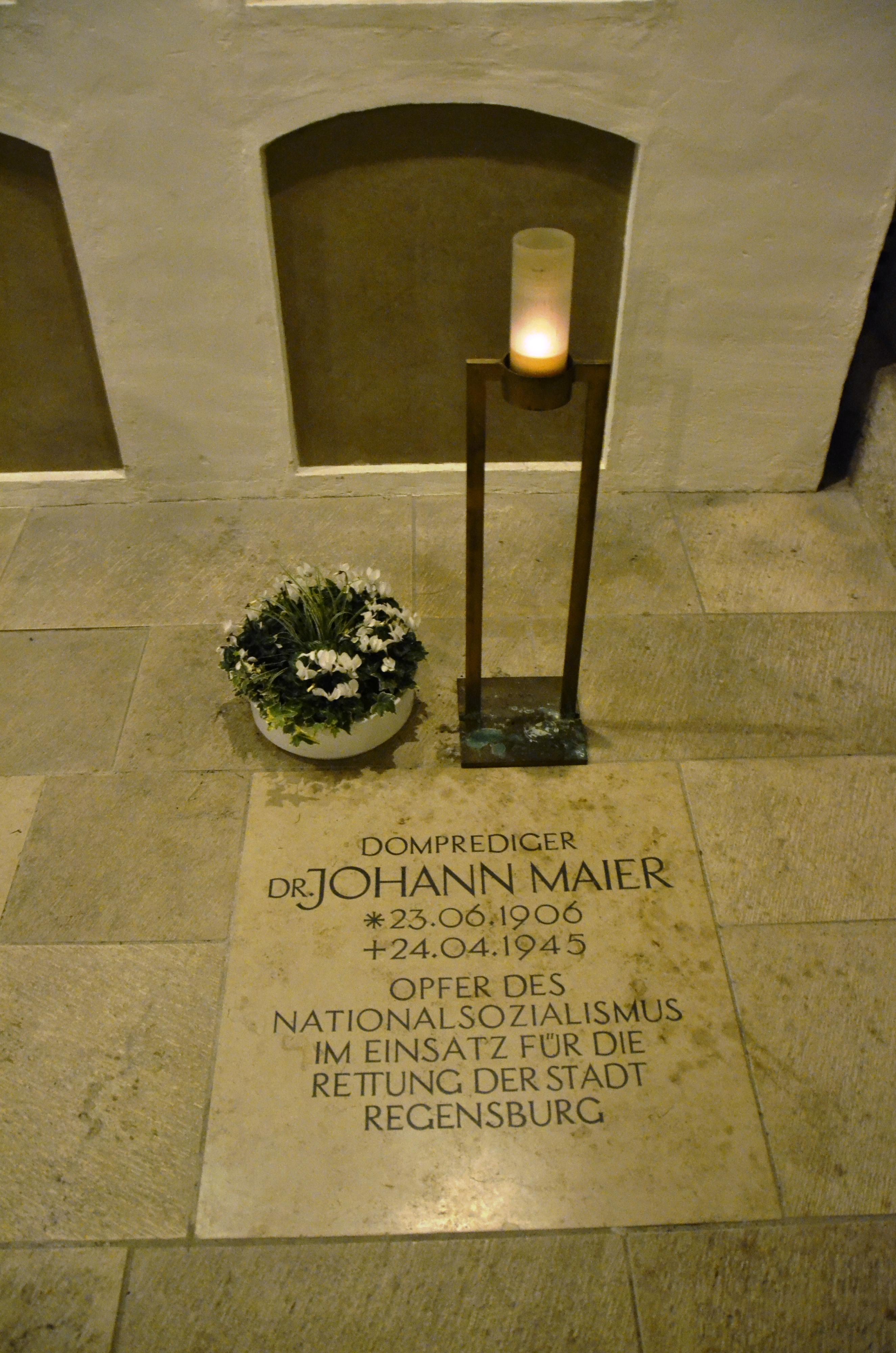 Das Grab von Johann Maier in der Bischofsgrablege des Regensburger Domes.